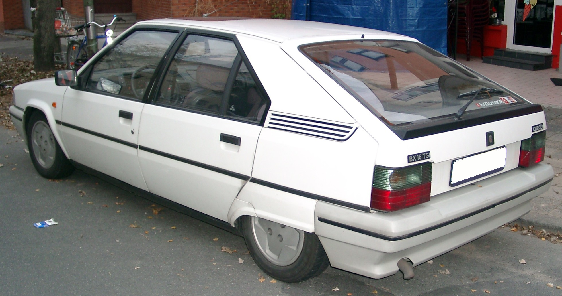 Citroën BX 16 TGi